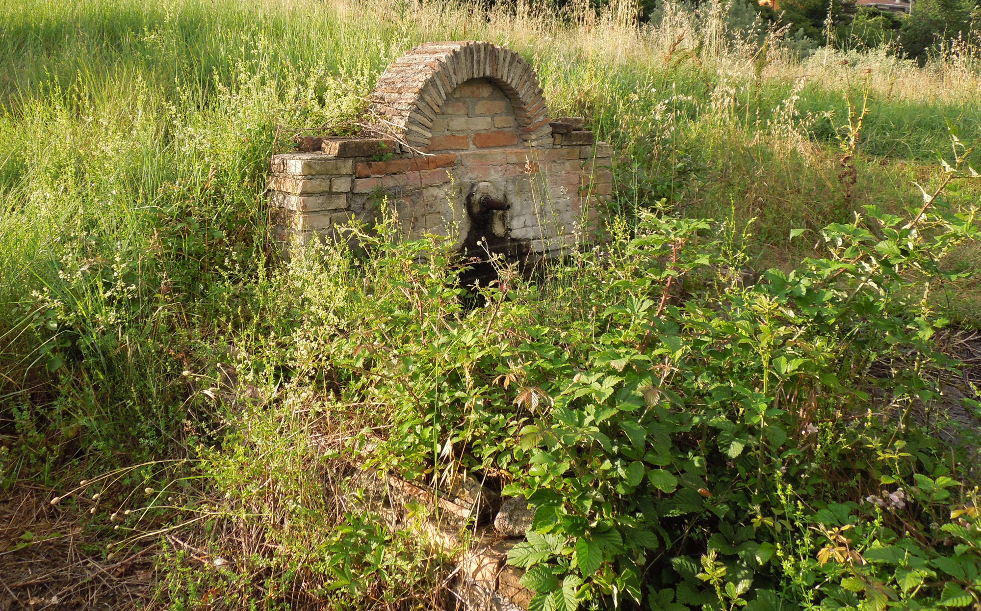 Immagine diurna di Fonte del Latte di Teramo